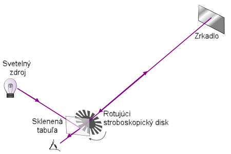 Popis: Diagram Fizeau-Foucaultovho prístroja Zdroj: Vlastná tvorba Dátum: 09.10.2005 Autor: Maros M r a z na zaklade Image:Speed of light (Fizeau).PNG Povolenie: GFDL Iné verzie tohto súboru: nie Soubor:Speed of light (Fizeau) cz.png Bild:Fizeauexperiment.png Image:Speed of light (Fizeau).PNG